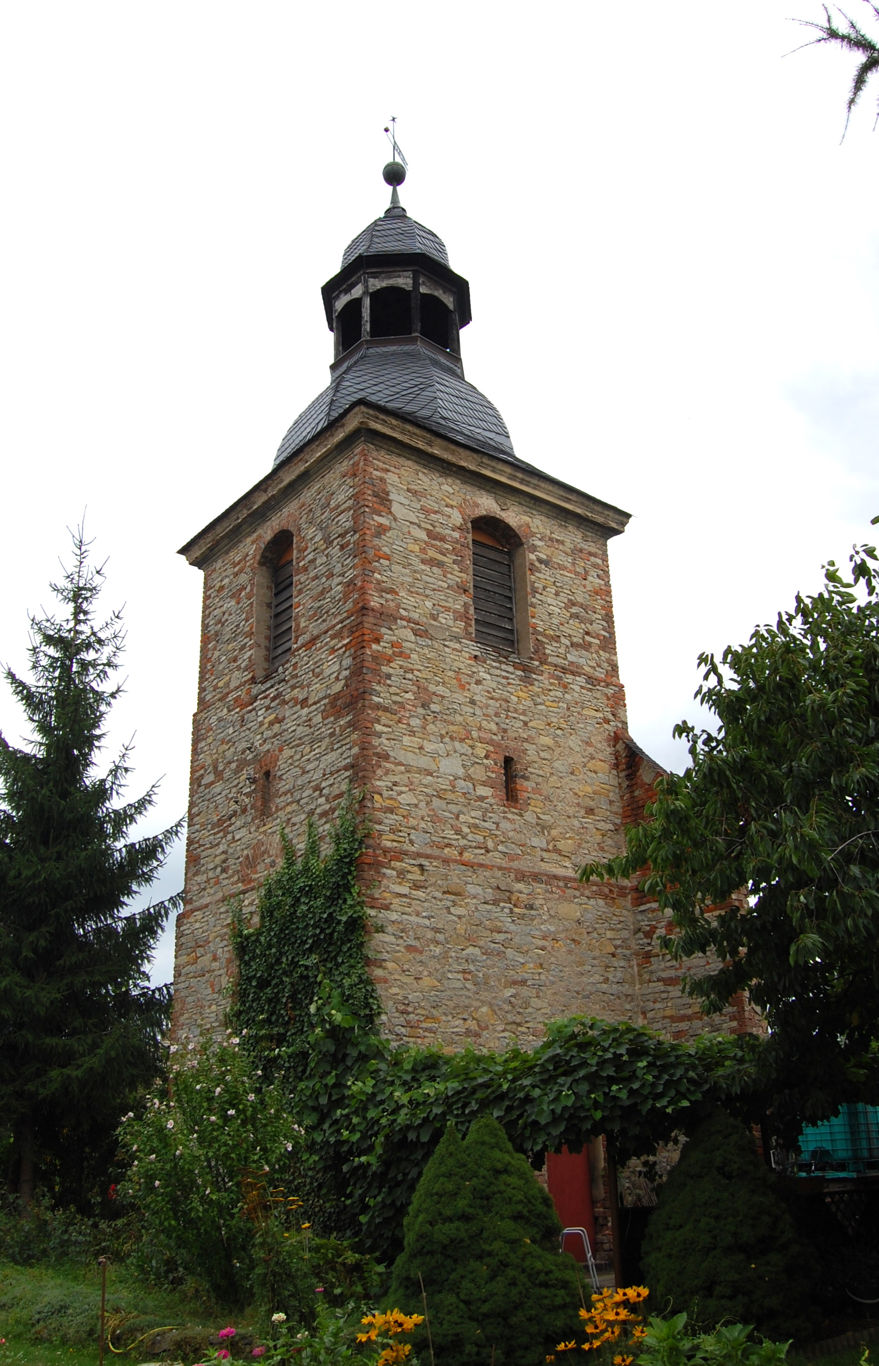 Turm der Martin-Luther-Kkirche in Felgeleben